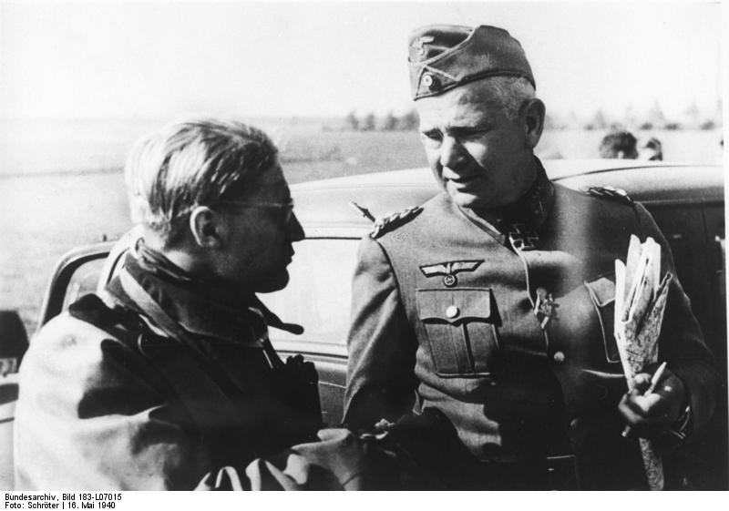 Kurze Begegnung auf dem Schlachtfeld Generaloberst von Reichenau bei einem kurzen Gespräch mit seinem Sohn der als Panzerschütze in einem Panzerregiment dient. 16.5.40